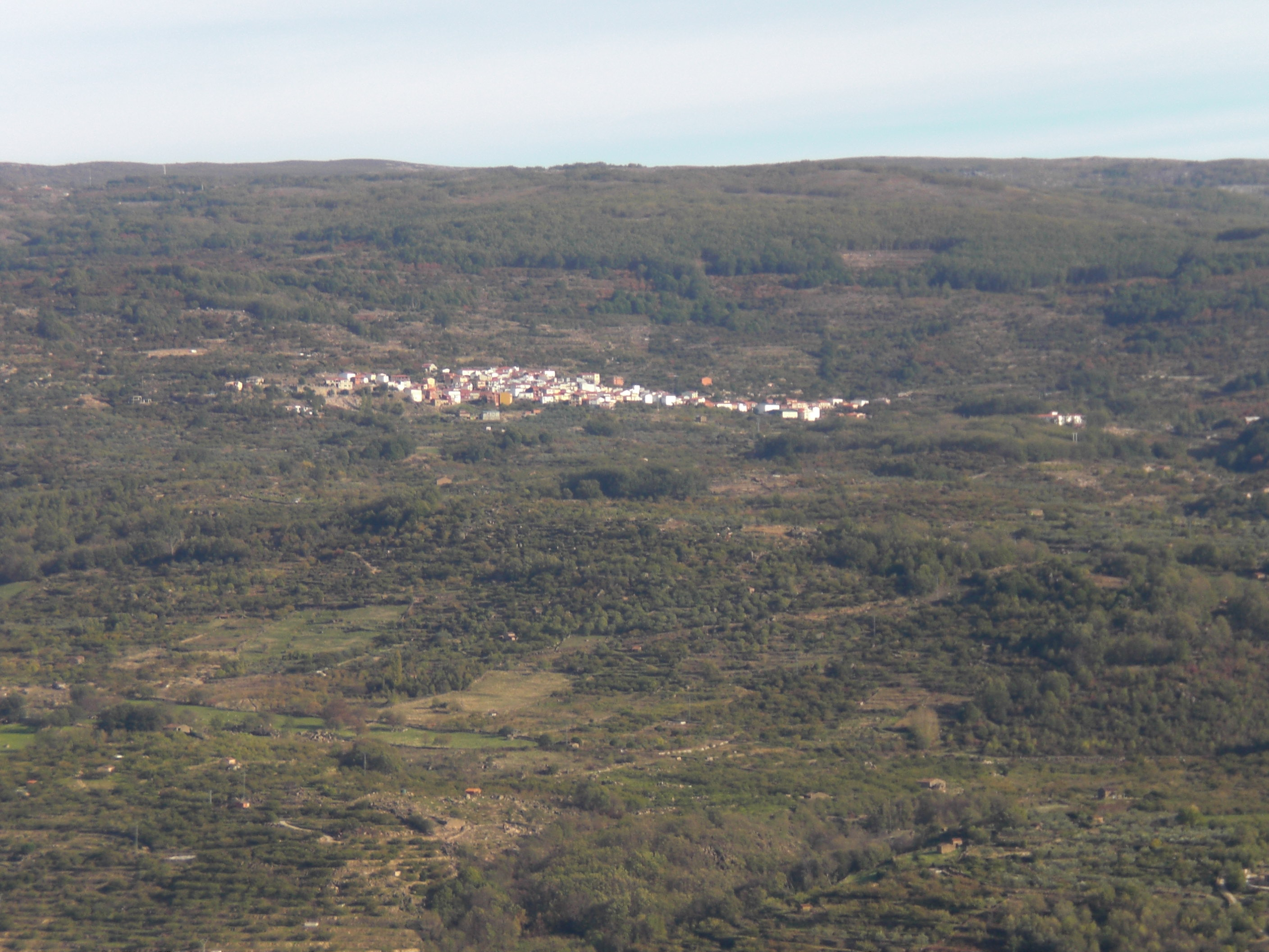 panoramo de la loĝloko Cabrero